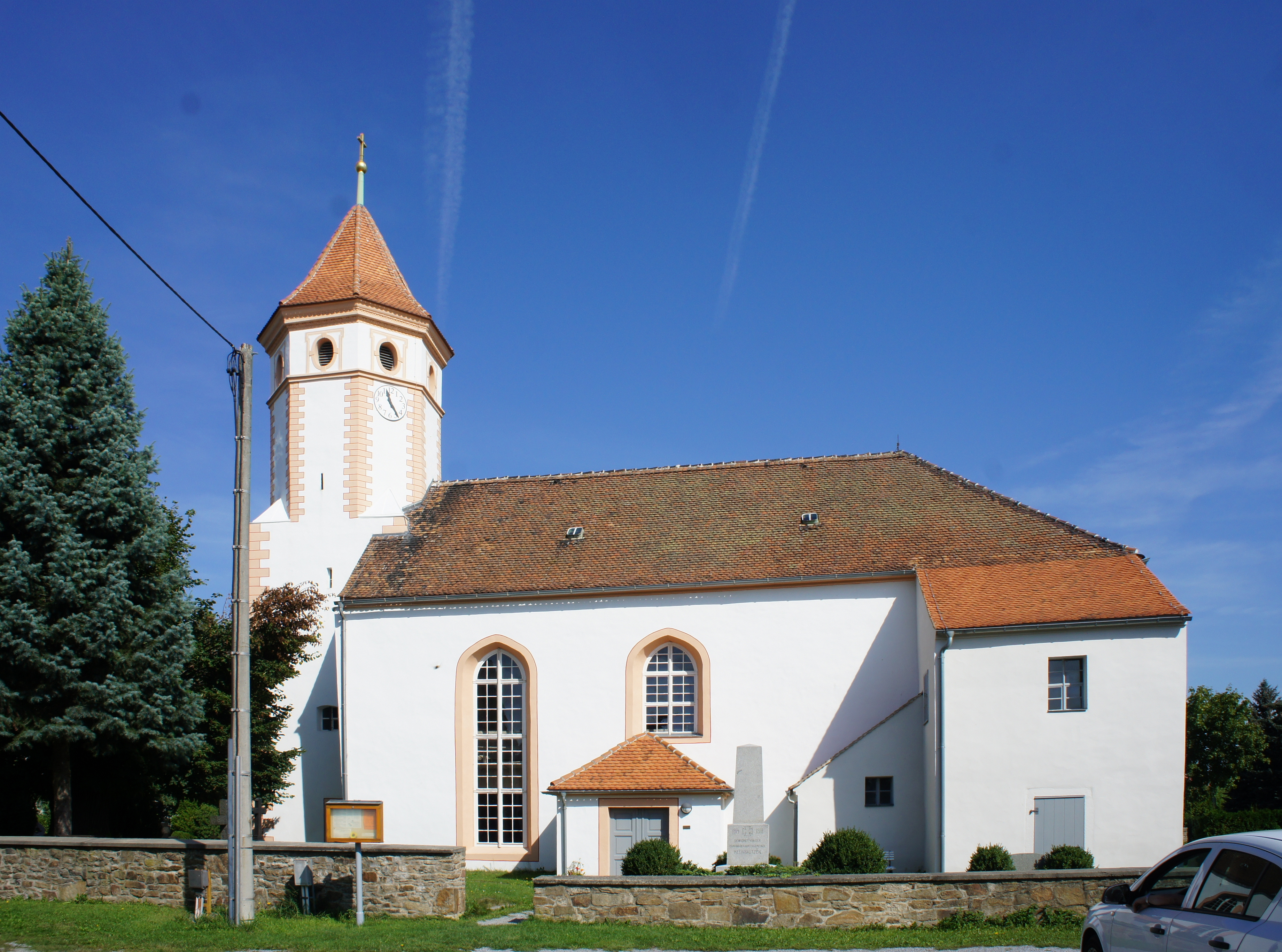 Ev.-luth. Kirche Kleinbautzen. Erbaut 1675, Holzschnitzwerke und Ornamente im Renaissancestil. Altarraum, Taufgestell und Betstube im Renaissance- und Barockstil.